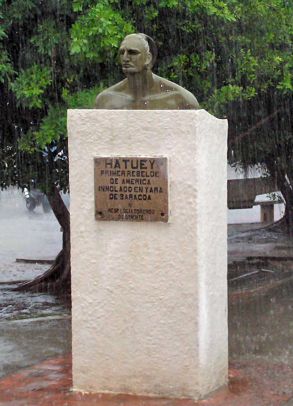 Buste de Hatuey, premier héros national de Cuba − Baracoa.